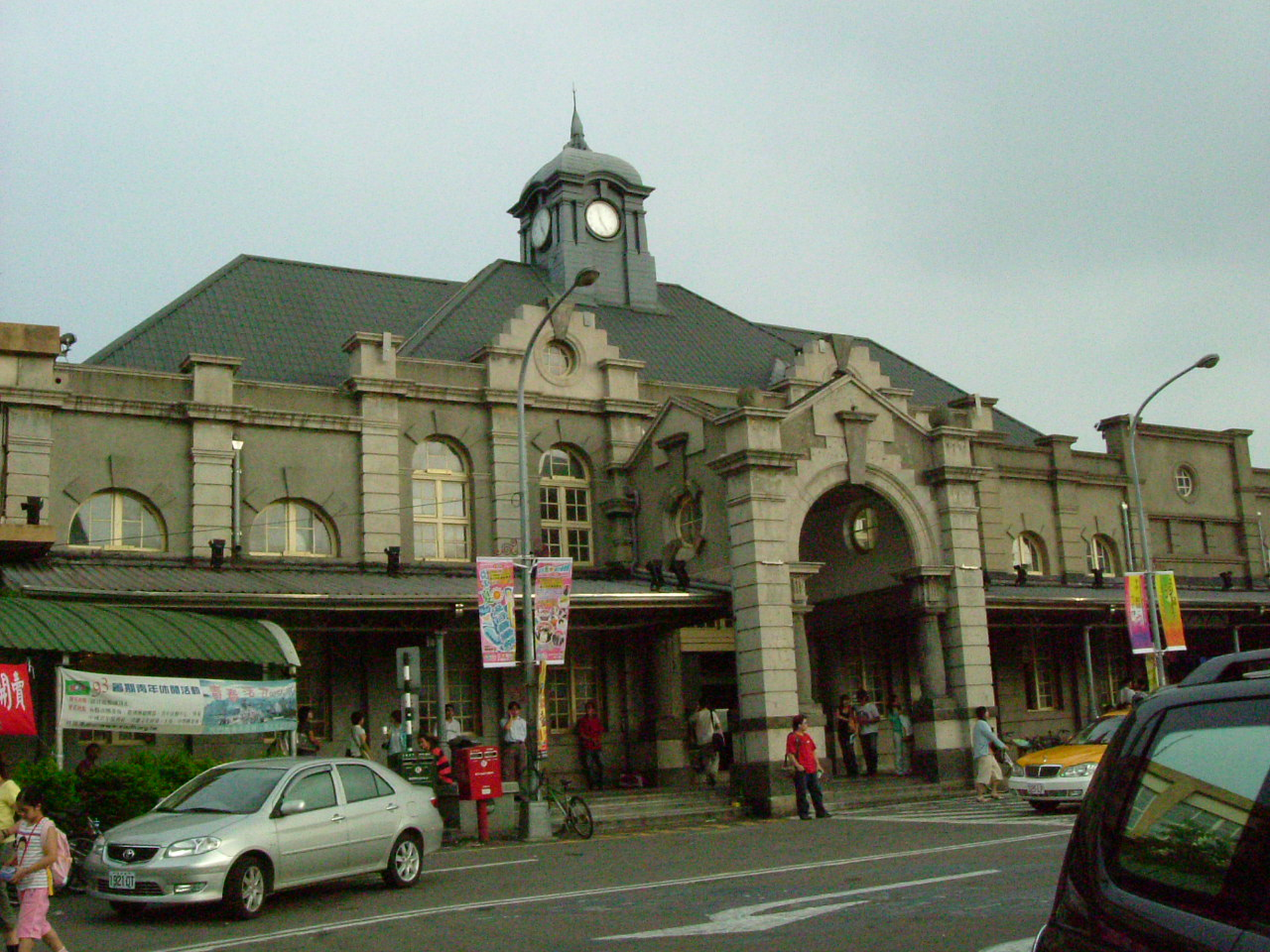 台鐵新竹車站。